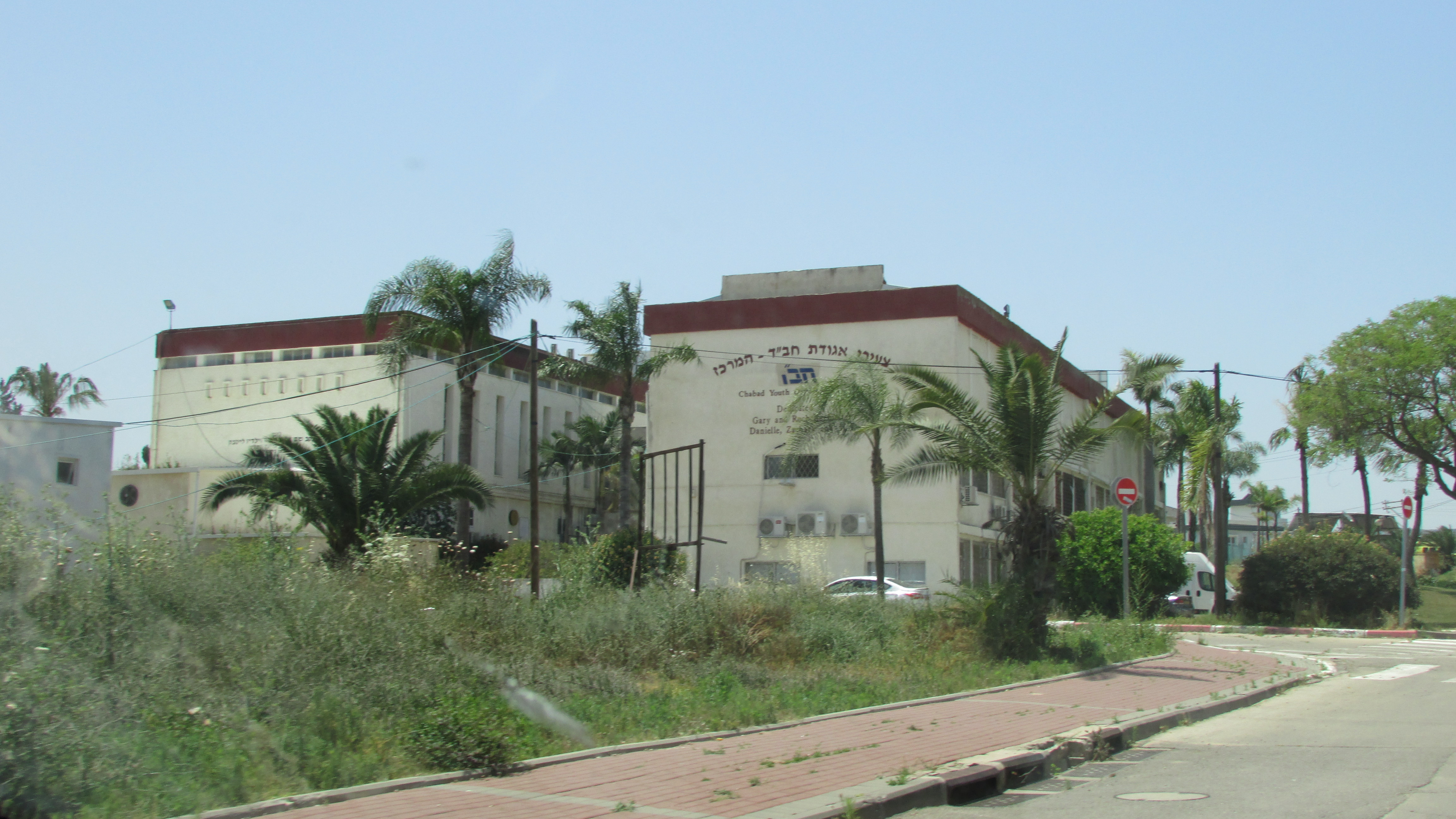 Kfar Chabad